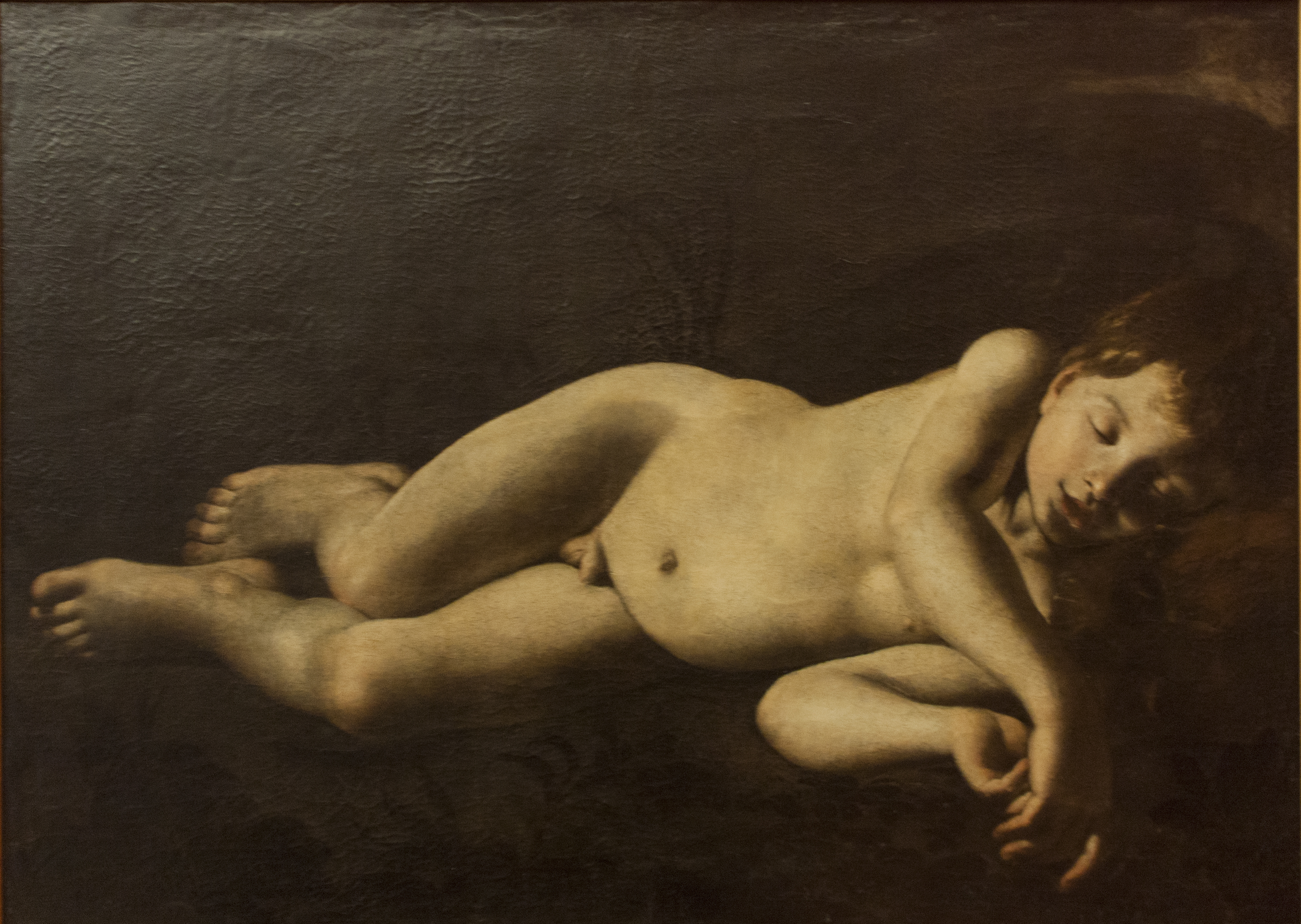 Amore dormiente - Giovan Battista Caracciolo Olio su tela 72,5 x 96,5 cm Provenienza: Palermo, Museo Nazionale